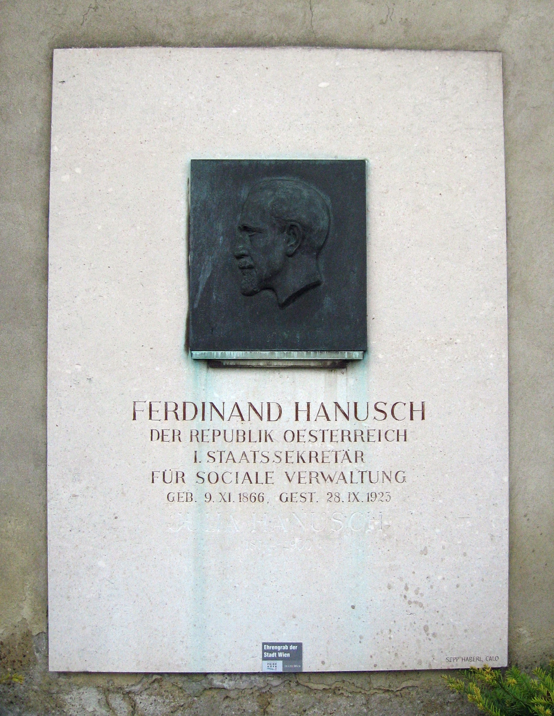 Wien, Feuerhalle Simmering, Urnengrabstelle Ferdinand Hanusch